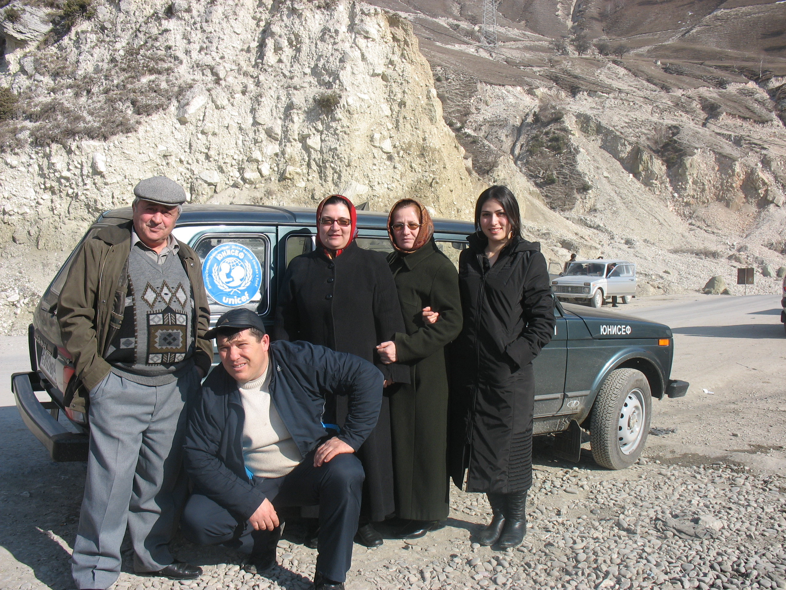 Програма толерантности и дружбы народов направляется в сел. Ботлих